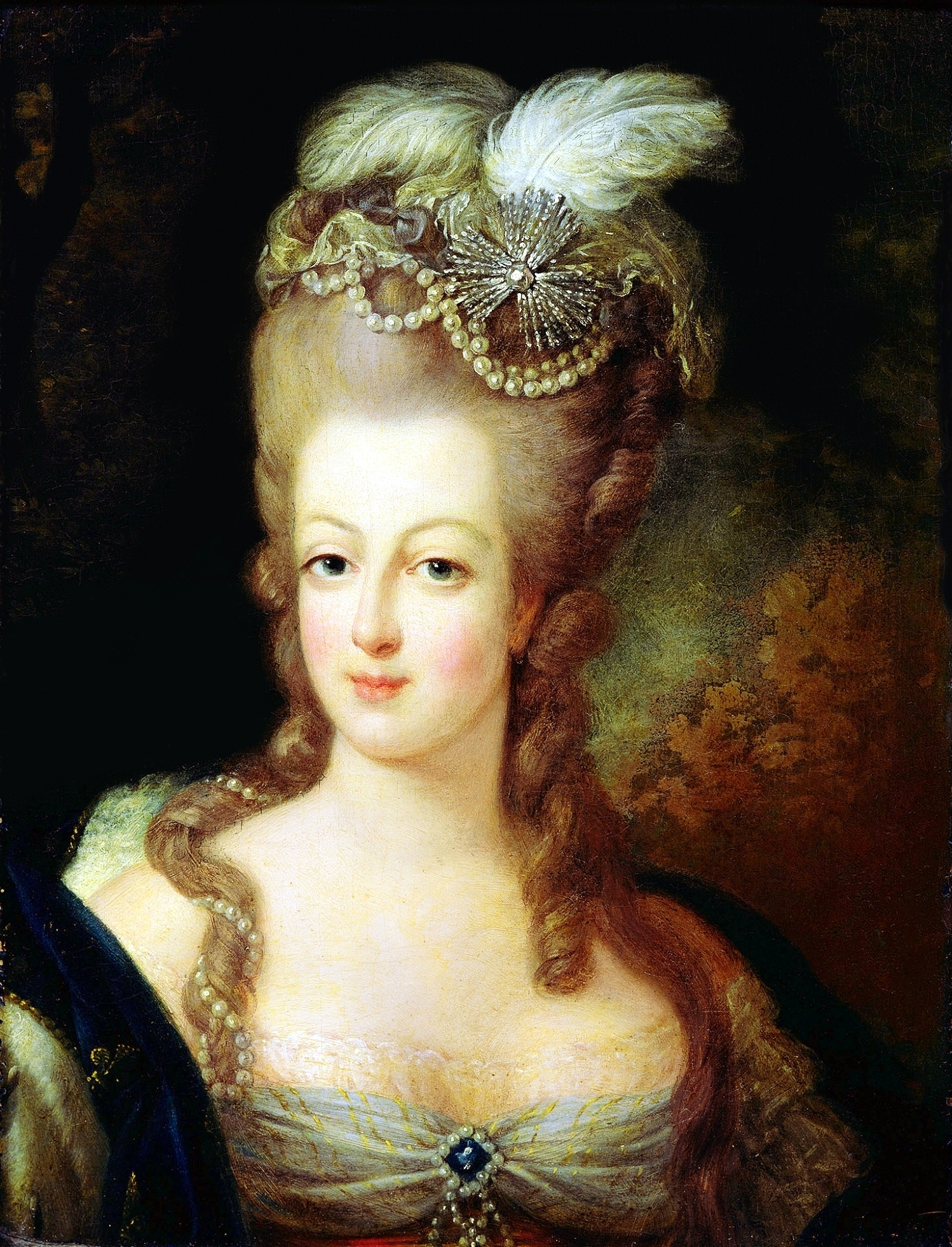 Portrait of Marie Antoinette (1755-1793)